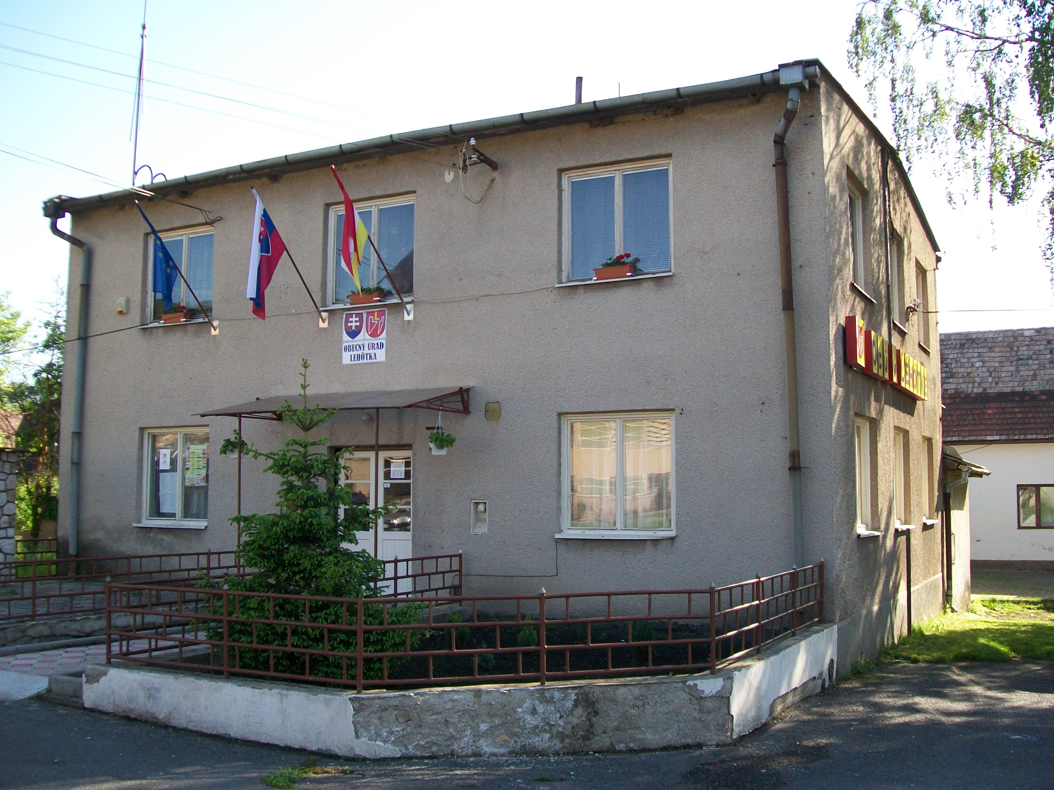 Obecný úrad v Lehôtke